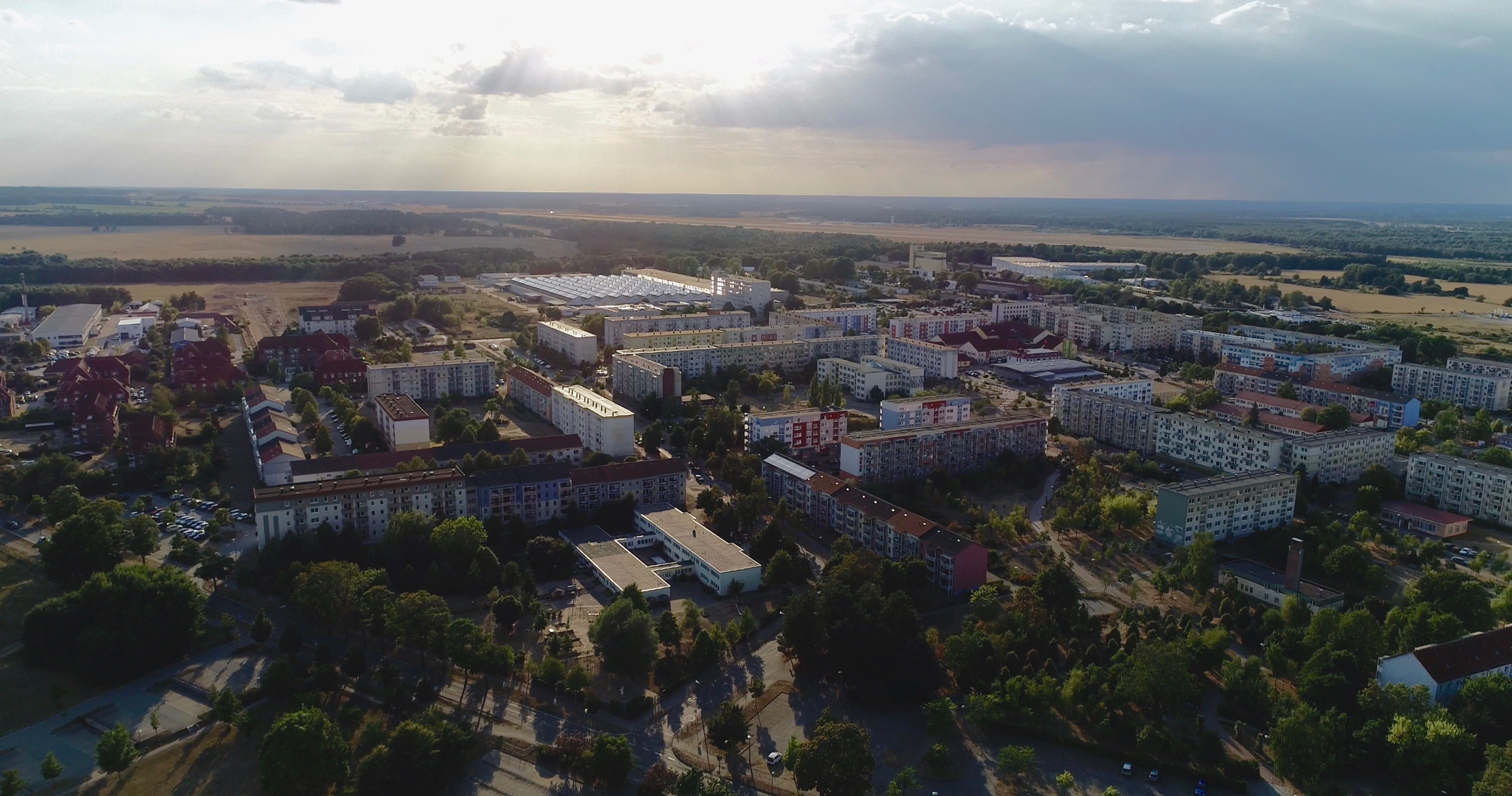 Weststadt Parchim, Luftaufnahme 2018 Blickrichtung Flughafen "Parchim International Airport"